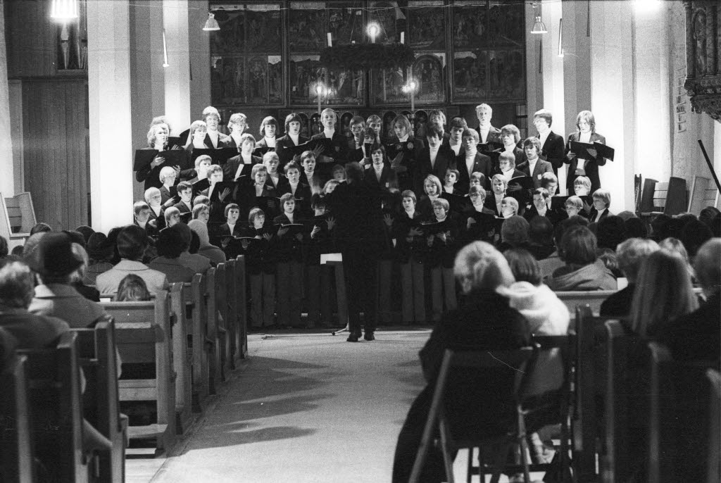 Kieler Knabenchor beim Adventsingen in der Nikolaikirche